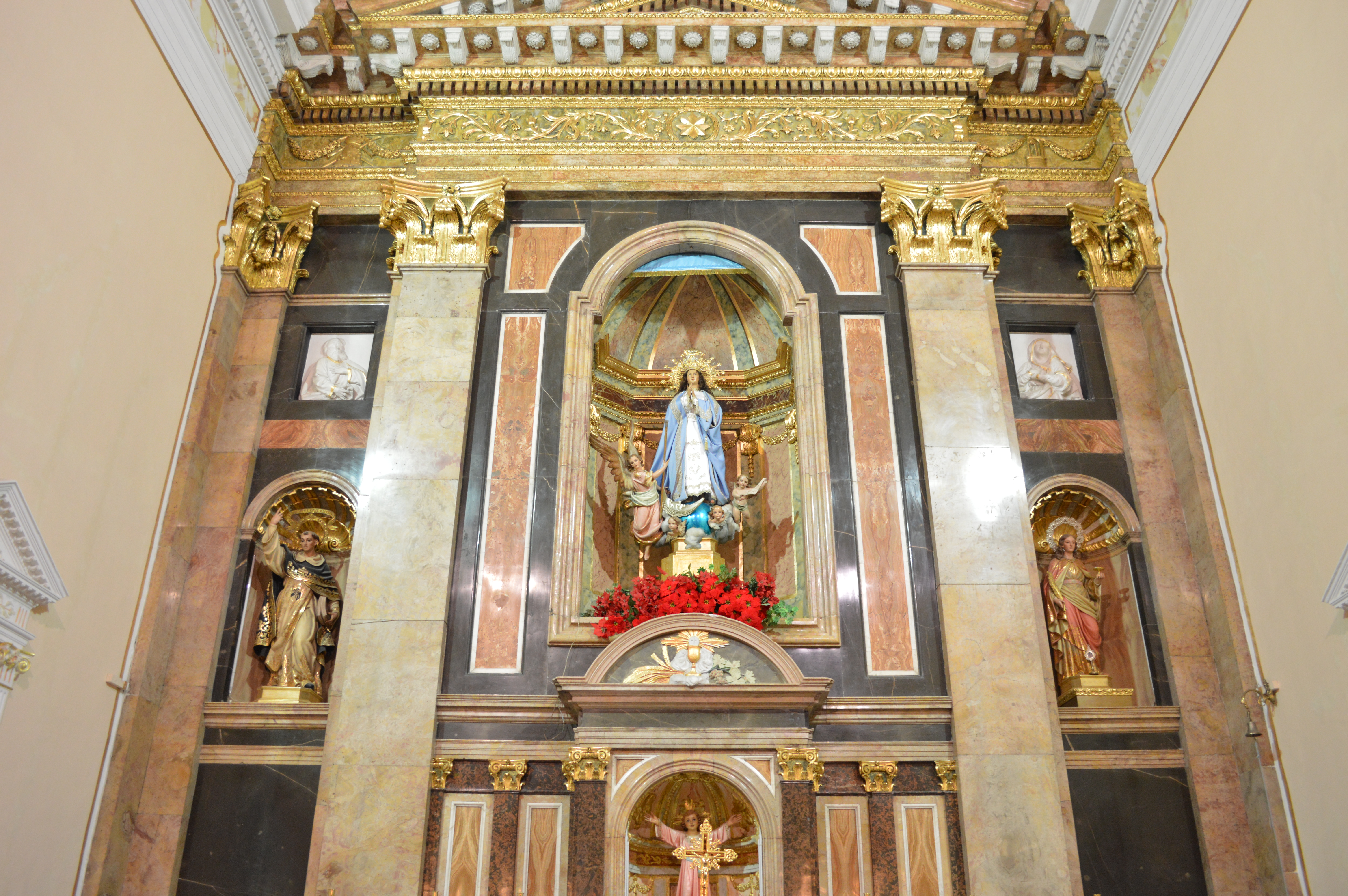 Retablo del altar a la Purisima Concepcion